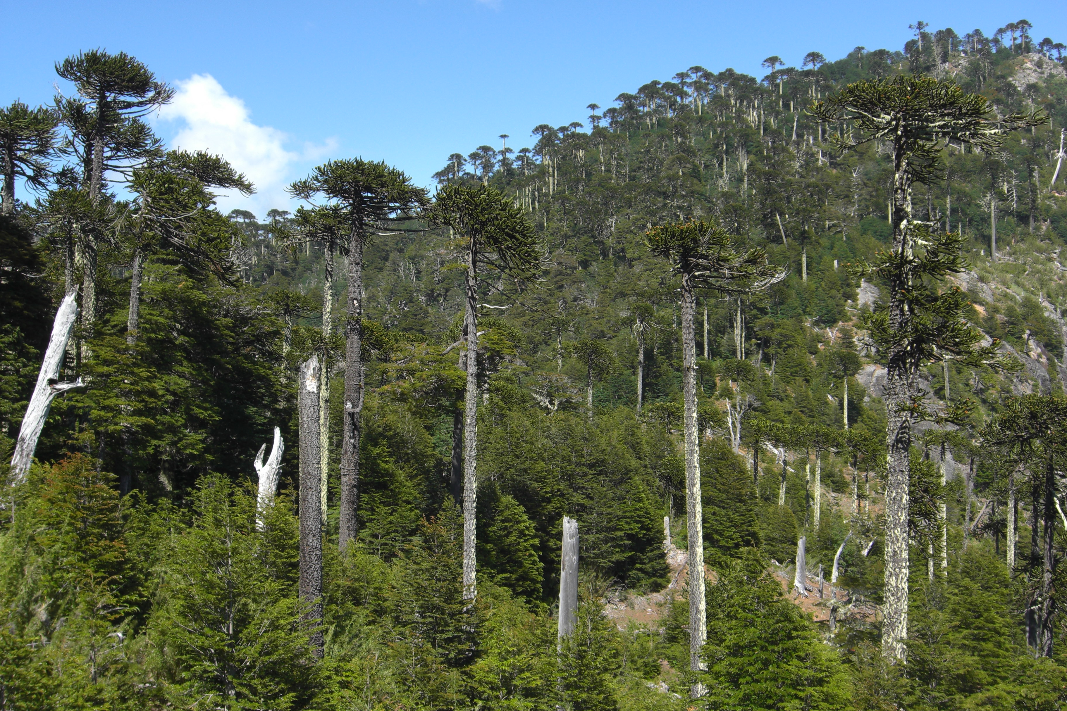 Araucaria araucana, Parque Nacional Huerquehue, Chile.